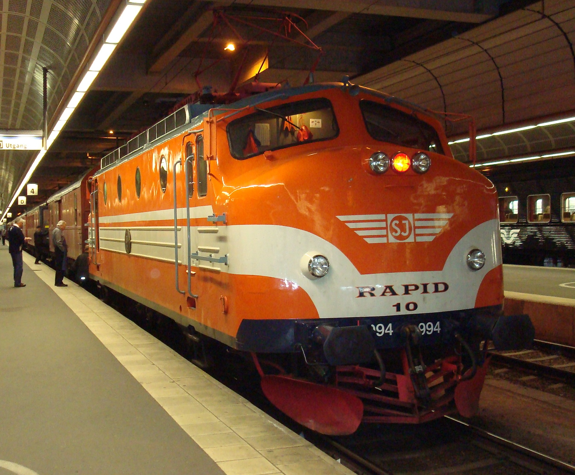 Rapidlok på Stockholms central